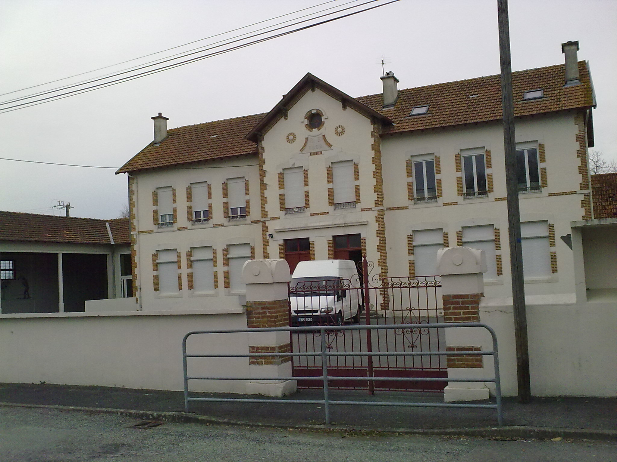 Ecole de Gabaston